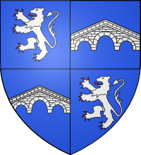 Armes de la branche de Pontbriand